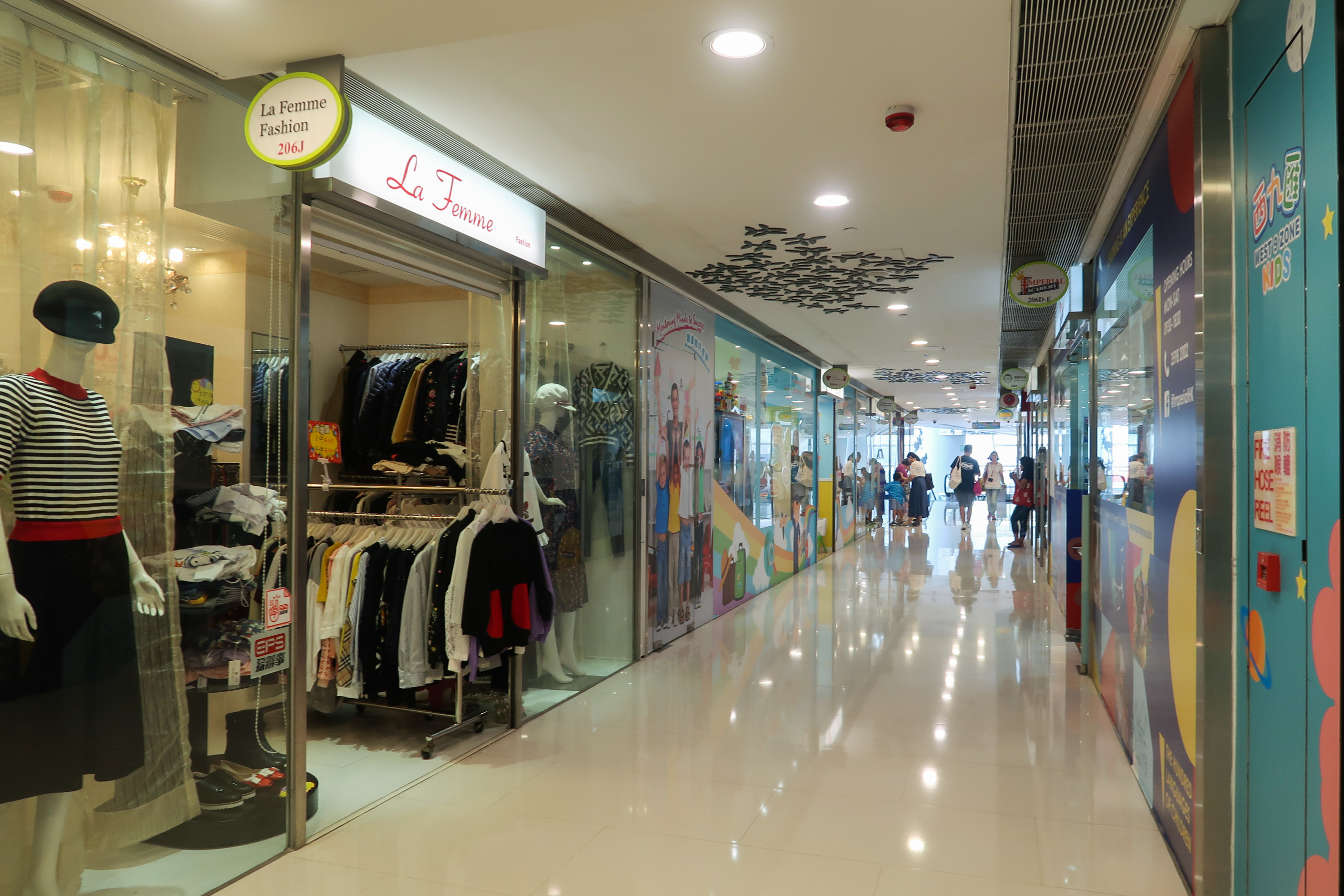 West 9 Zone Level 2